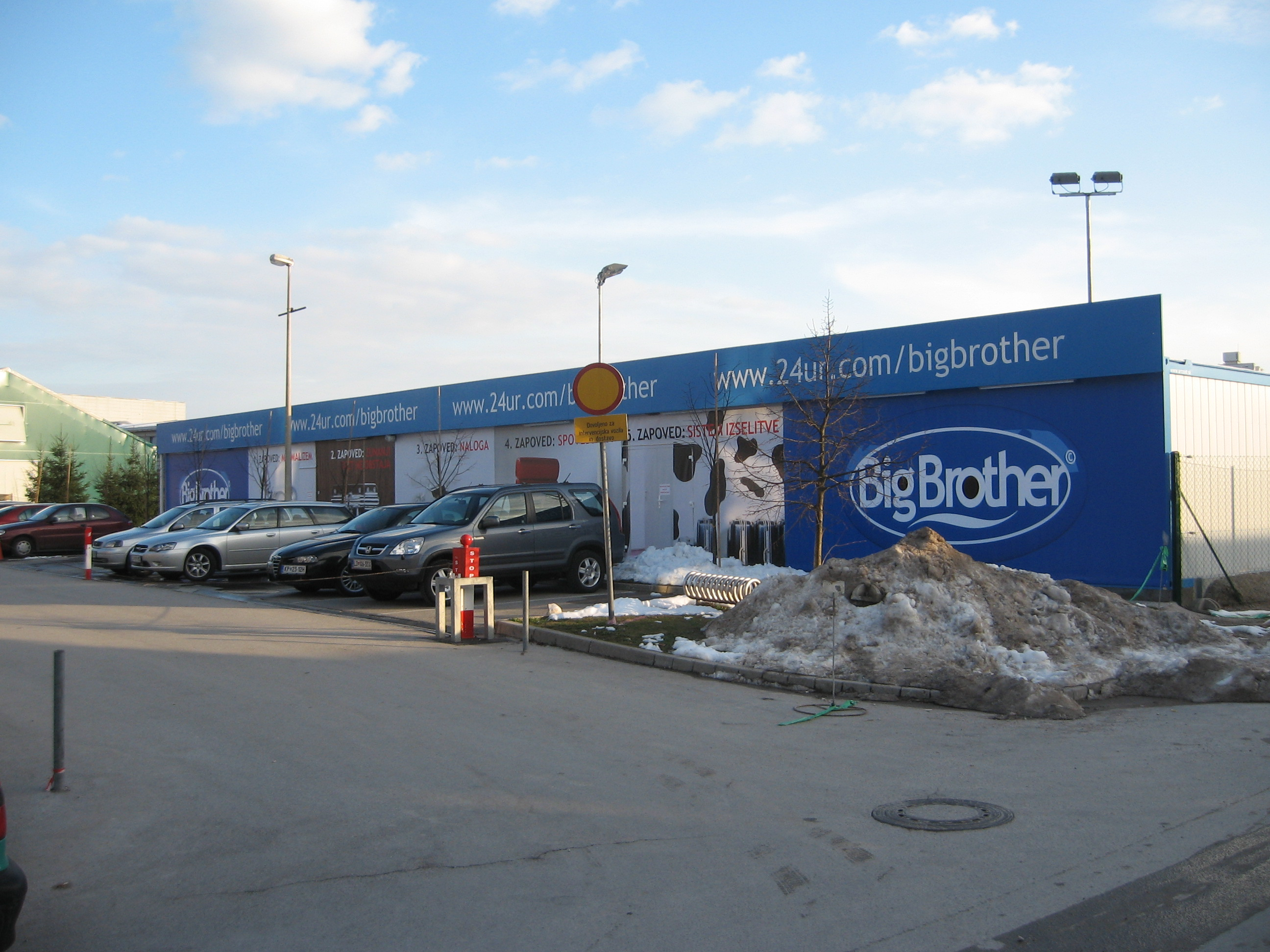 Stavba Big Brotherja Slovenija, Ljubljana